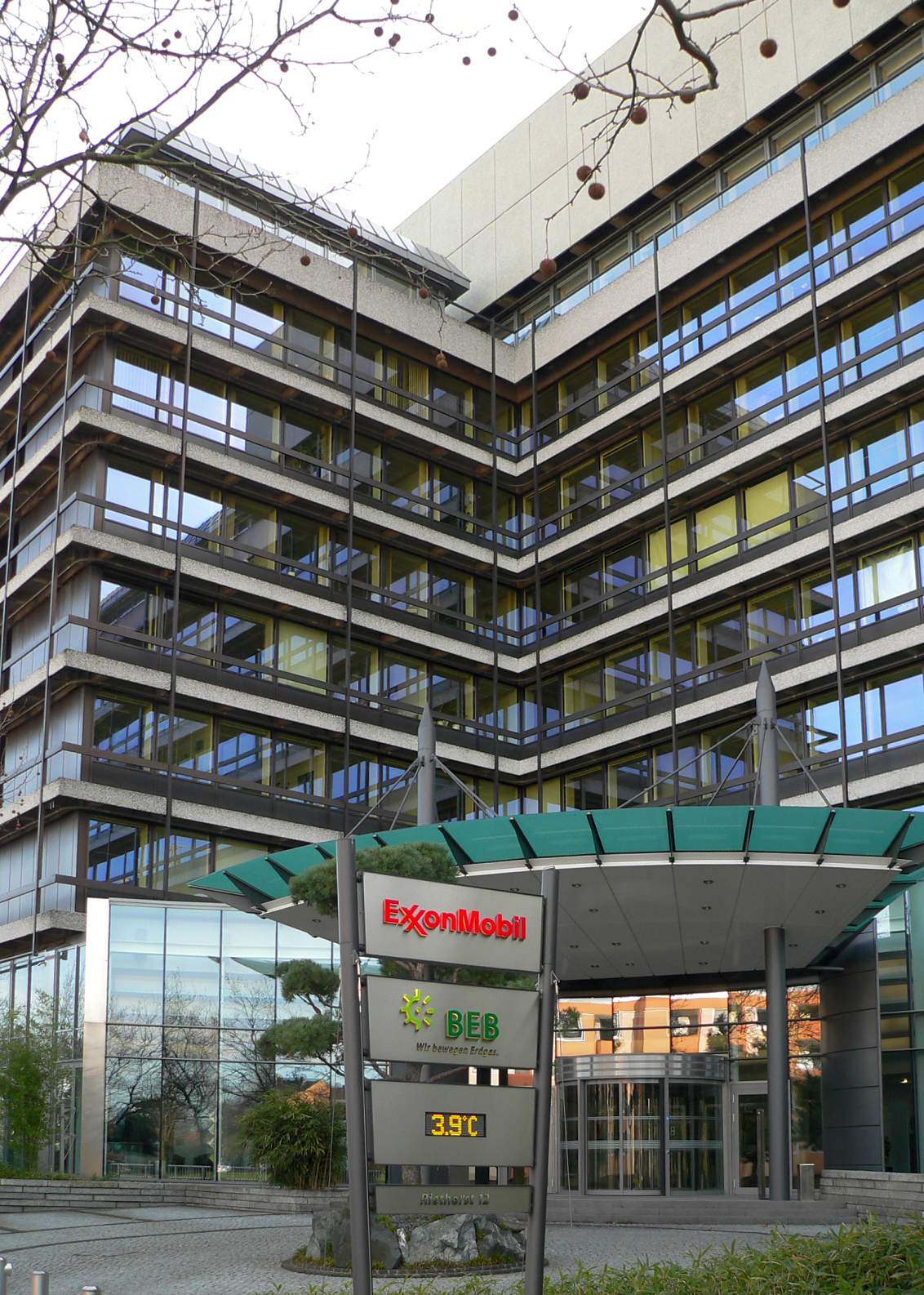 Hauptsitz BEB Hannover